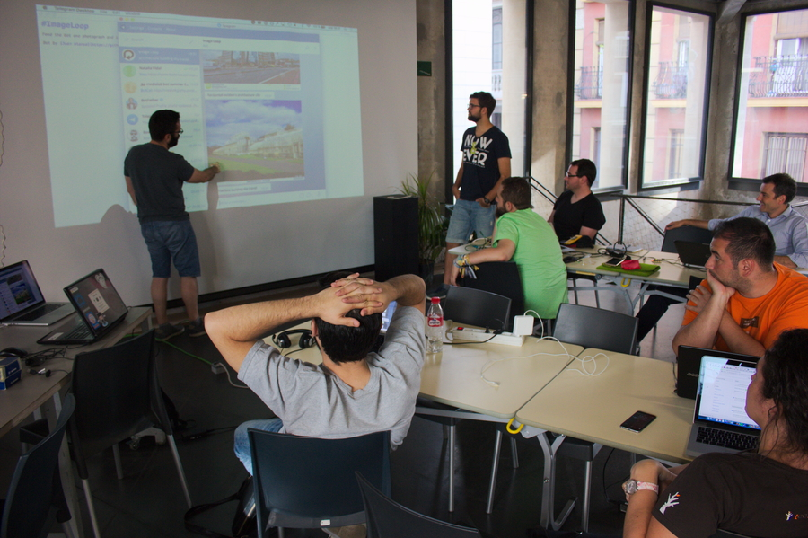 Una exposición acerca del desarrollo de un prototipo de un bot de Telegram bajo el mando de Juan Alonso. En ella se habla de un servicio para recoger descripciones de una imagen mediante la api de y después hace búsquedas de imágenes desde DuckDuckgo de sus características. Este proceso se hace en bucle para encontrar resultados instantáneos.